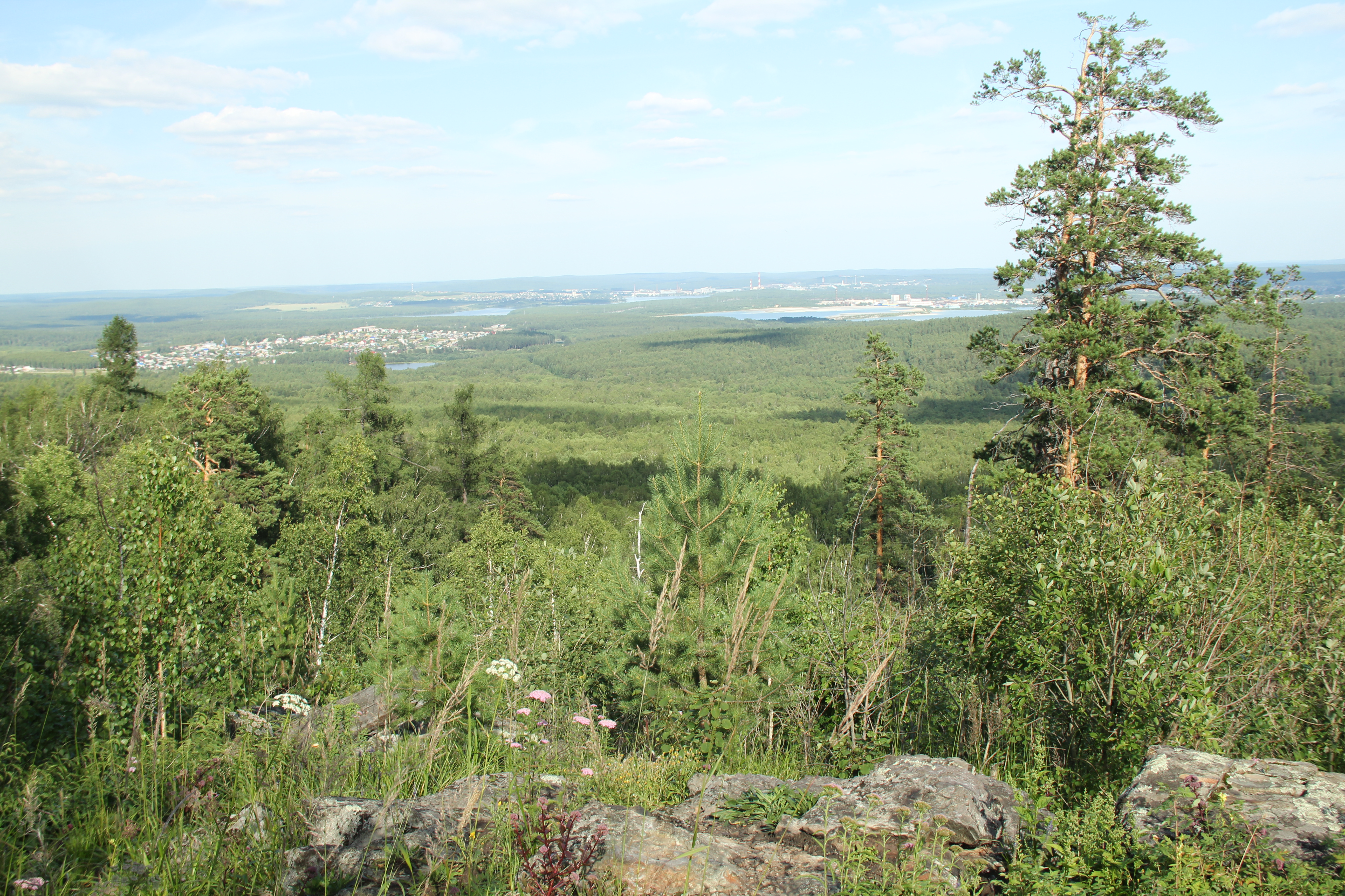 Вид на город Полевской с горы "Азов" This image is related to the protected area of Russia number 6610536